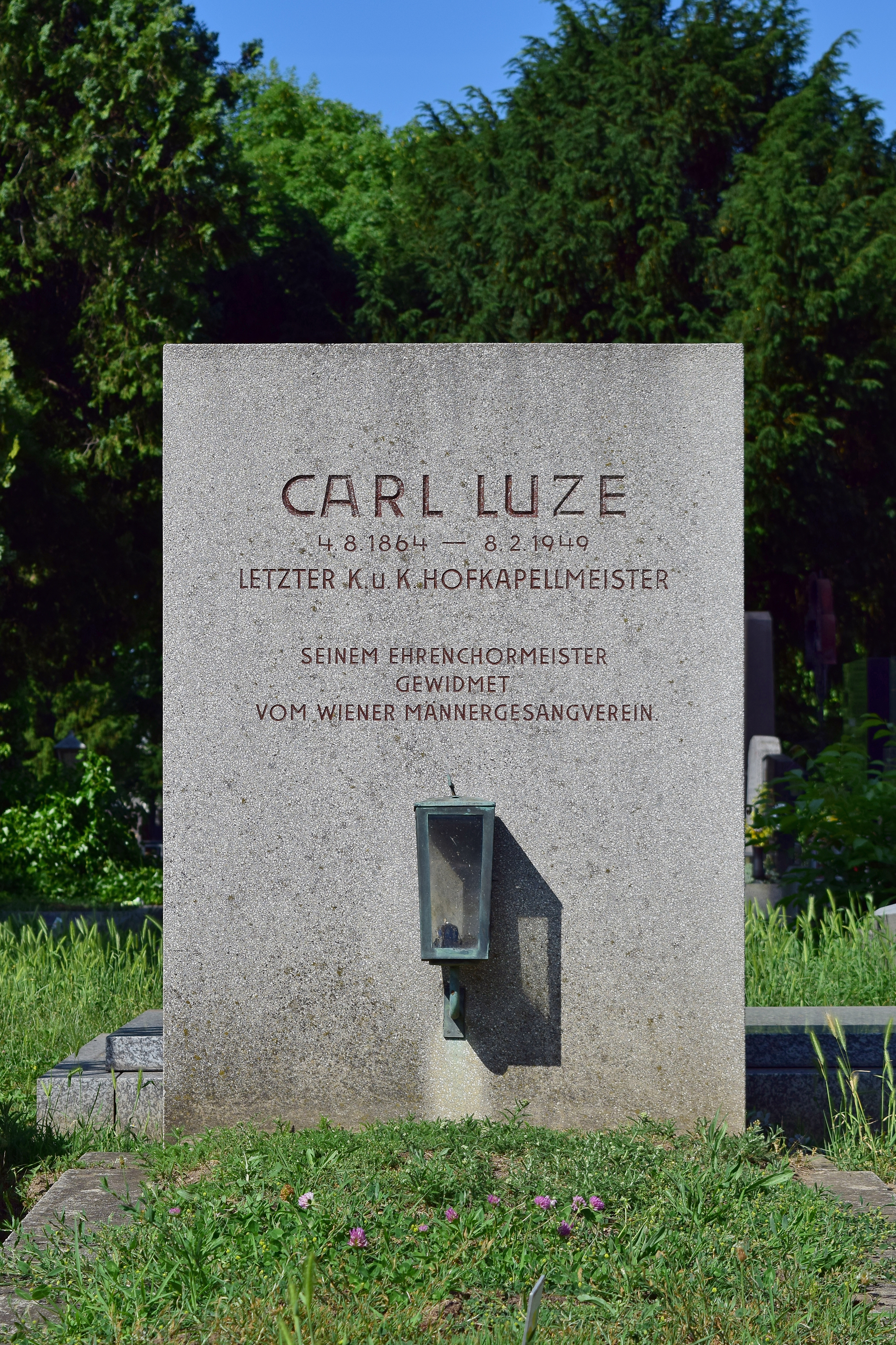 Ehrenhalber gewidmetes Grab von Karl Luze auf dem Wiener Zentralfriedhof.